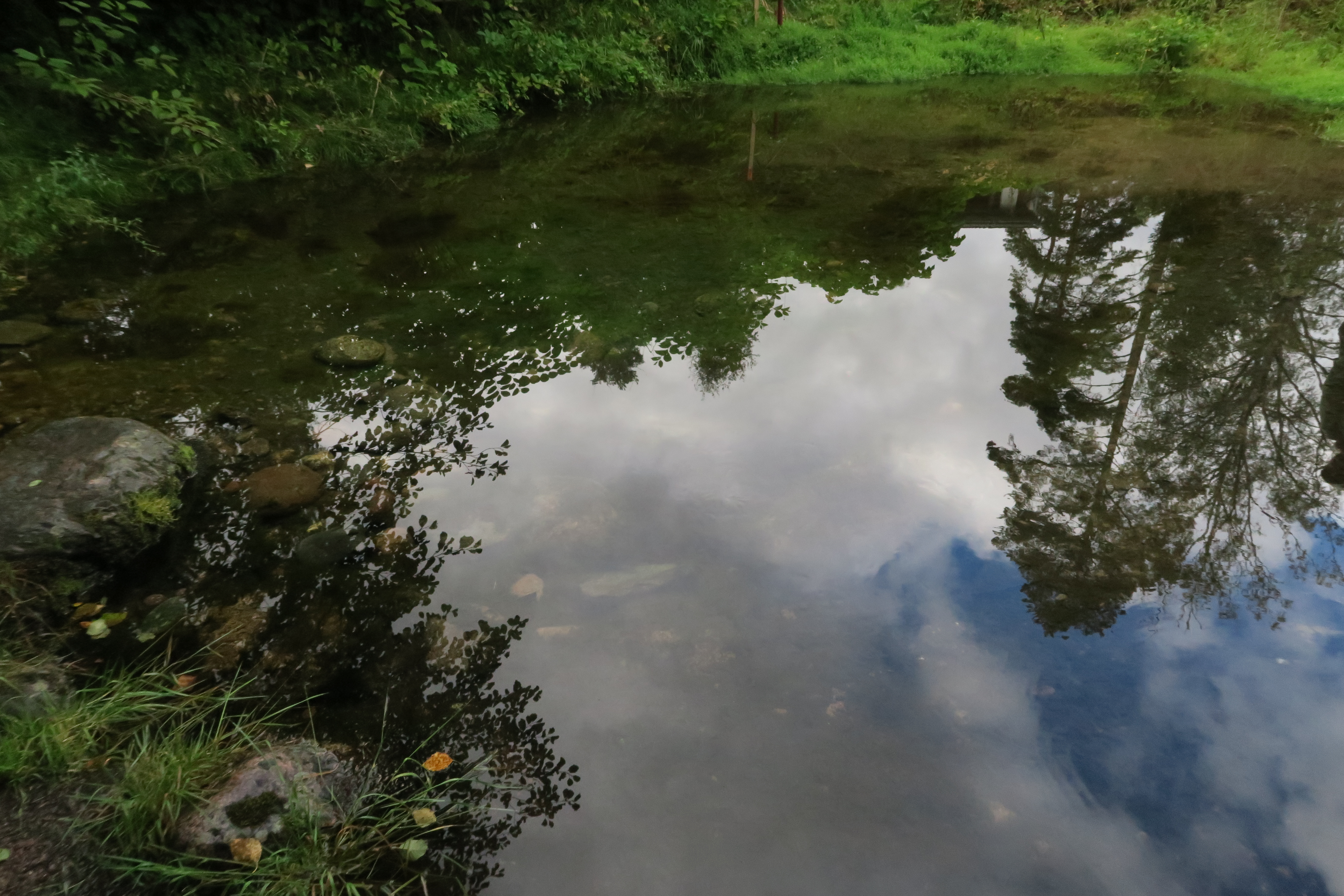 Kuninkaanlähde kankaanpäässä elokuussa 2016.